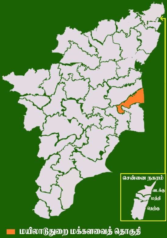 தமிழக வரைபடத்தில் உள்ள மயிலாடுதுறை மக்களவைத் தொகுதி